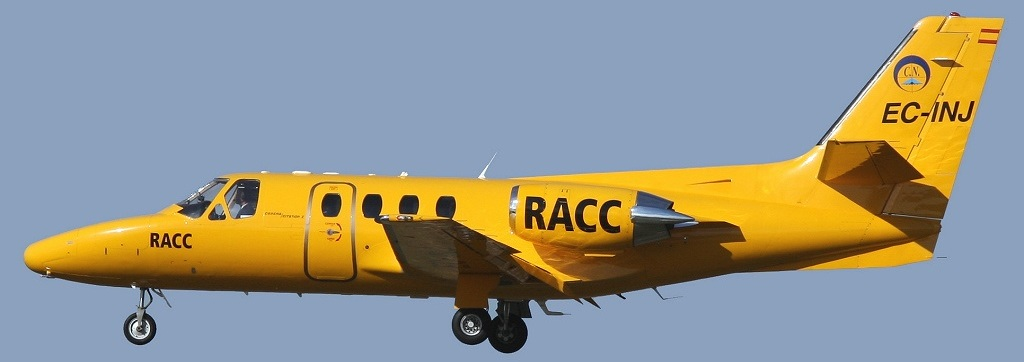 Cessna 501 Citation I/SP Barcelona (- El Prat) (BCN / LEBL) Spain, November 27, 2010 EC-INJ (cn 501-0086)